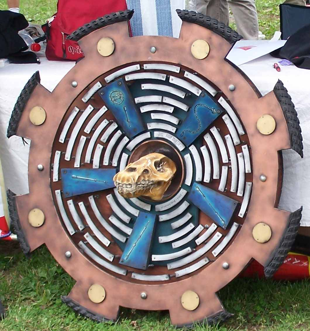 Ligaschale der dt. Juggerliga